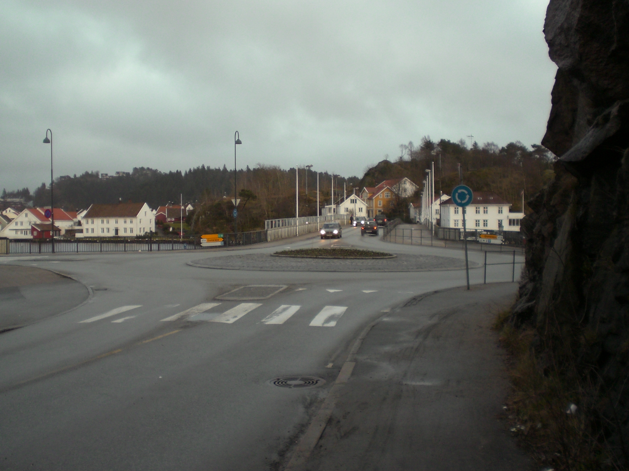 Brokrysset i Mandal sentrum. Krysset har 5 utganger. Her møtes også Fylkesvei 201 (Vest-Agder) og Fylkesvei 205 (Vest-Agder) for andre gang